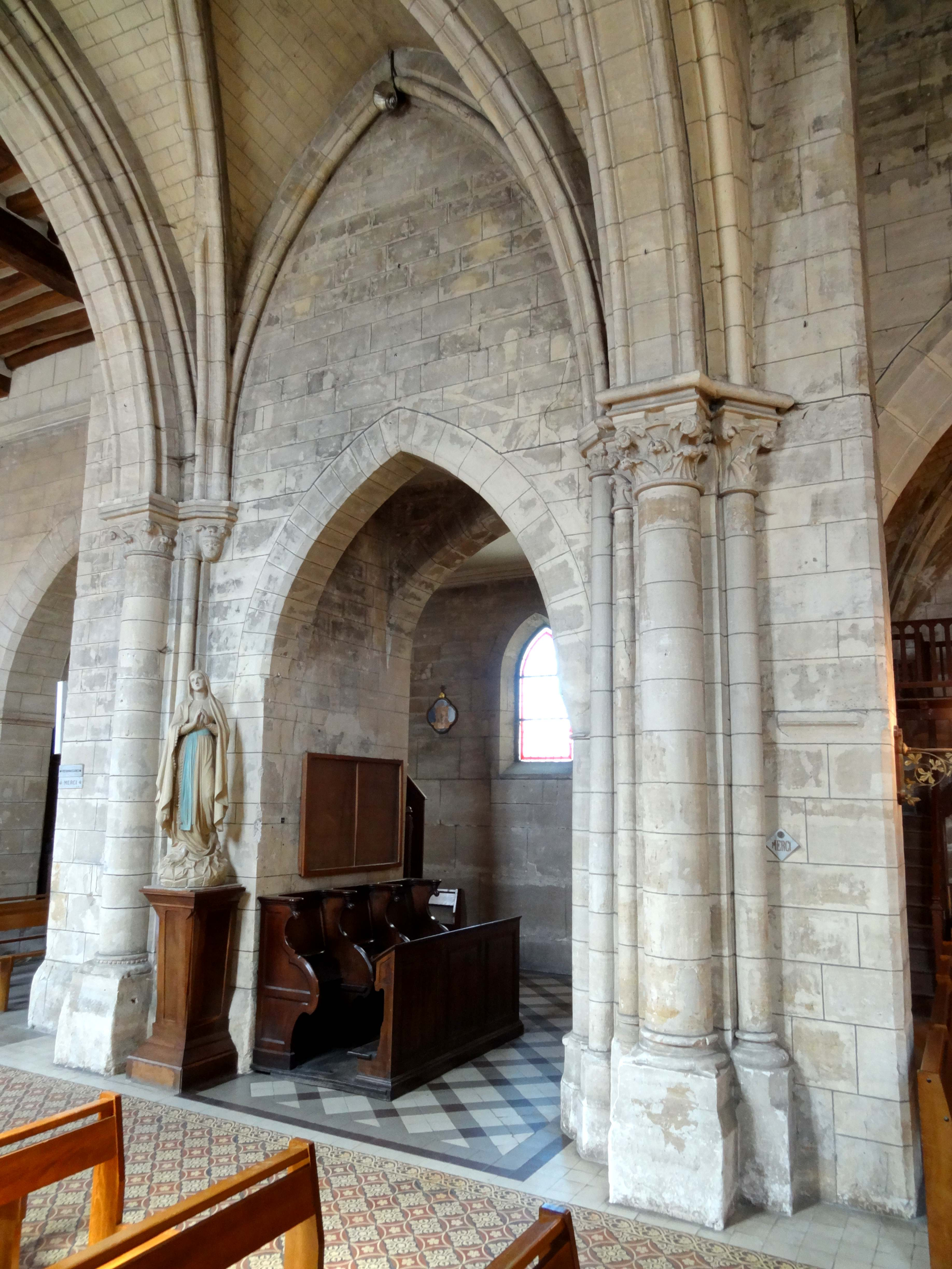 Intérieur de l'église - voir titre.